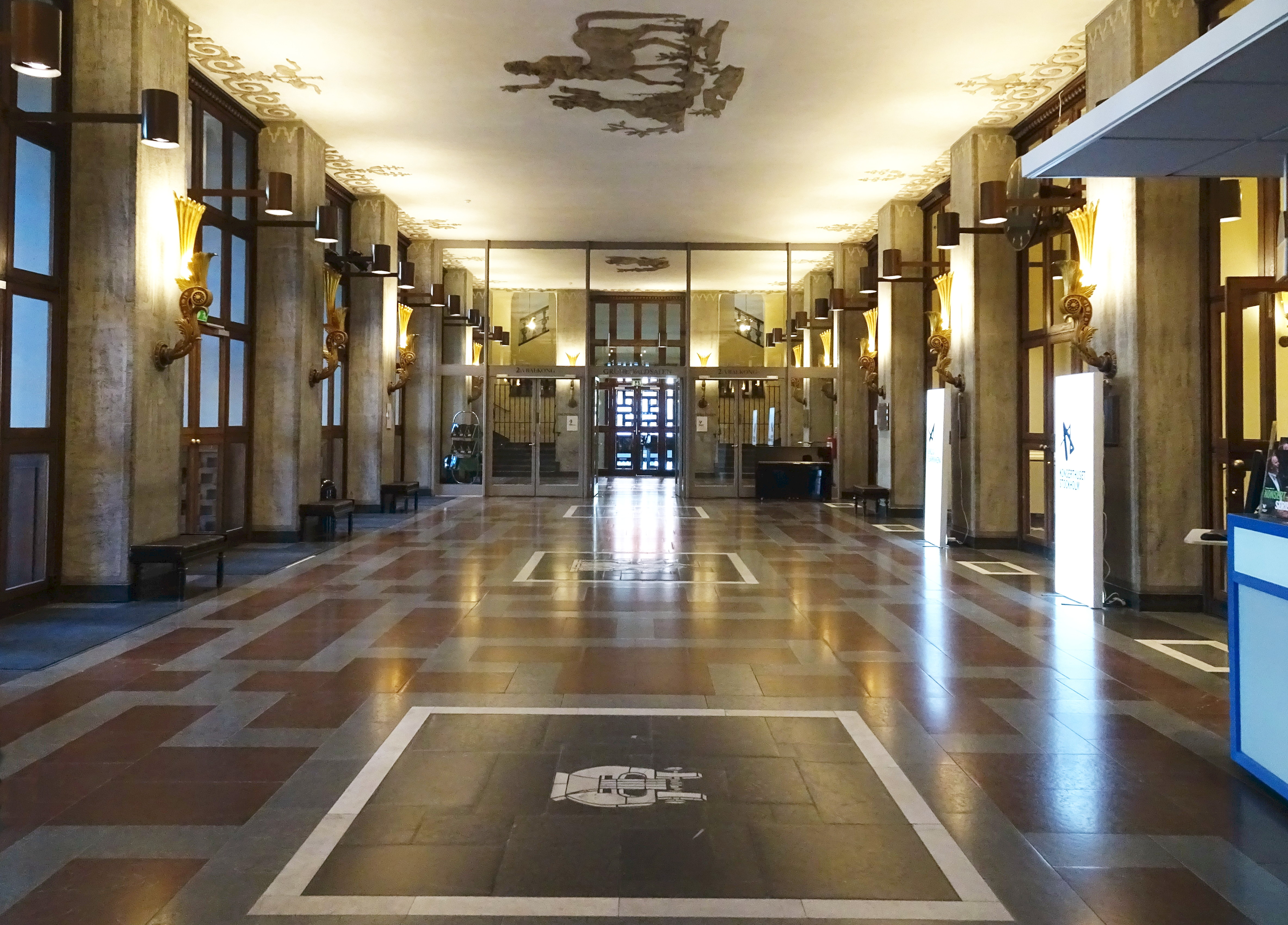 Konserthuset entréhallen